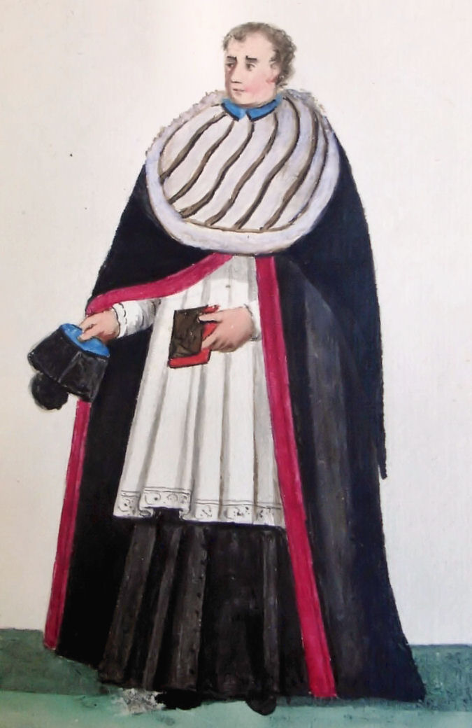 Manuscript:,Ludovicus Clercq and Leo Vlaming, ghent 1812, Waerachtige verbeeldingen van alle de cleedingen der religieuse ordens